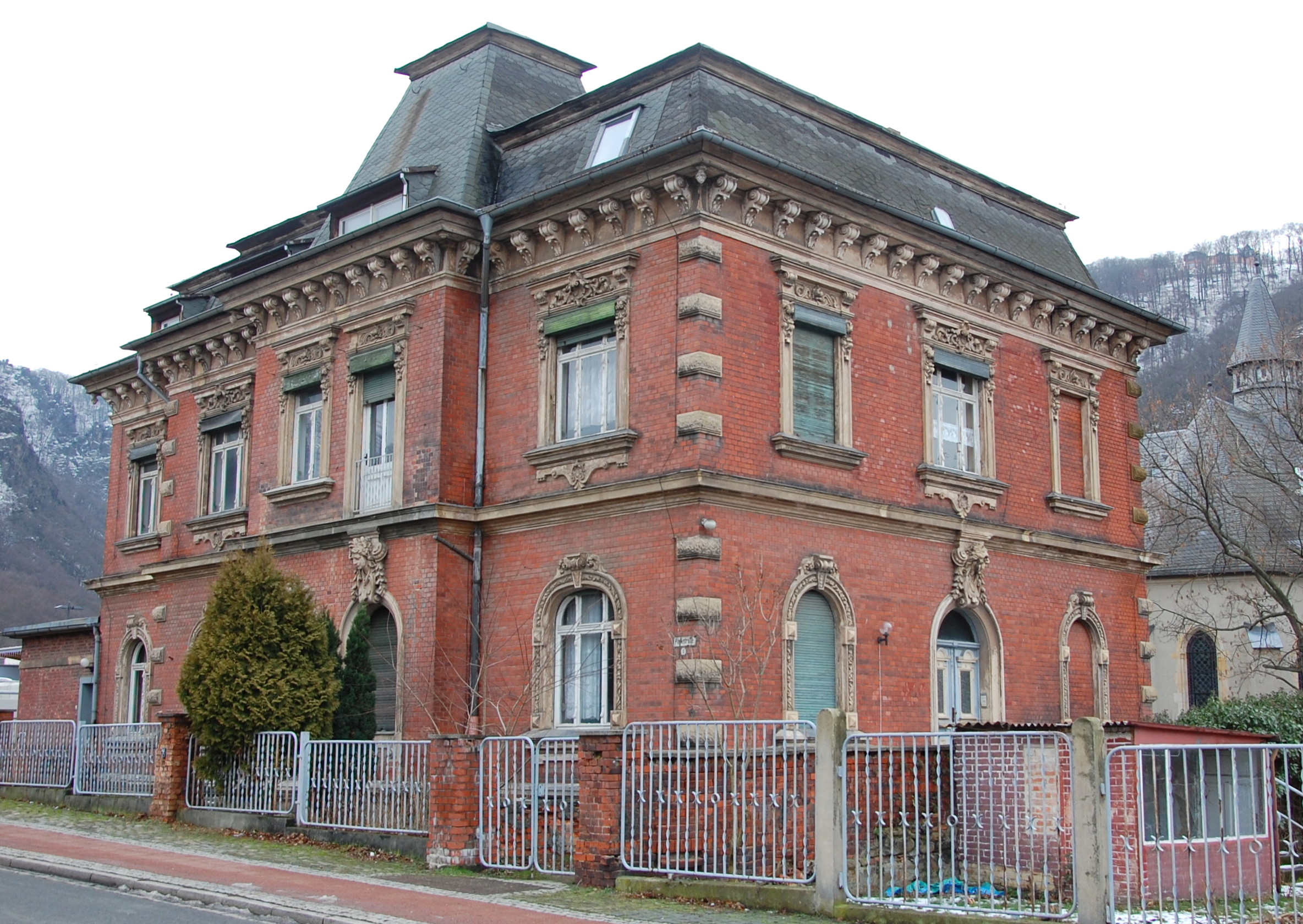 Haus Parkstraße 3 in Thale